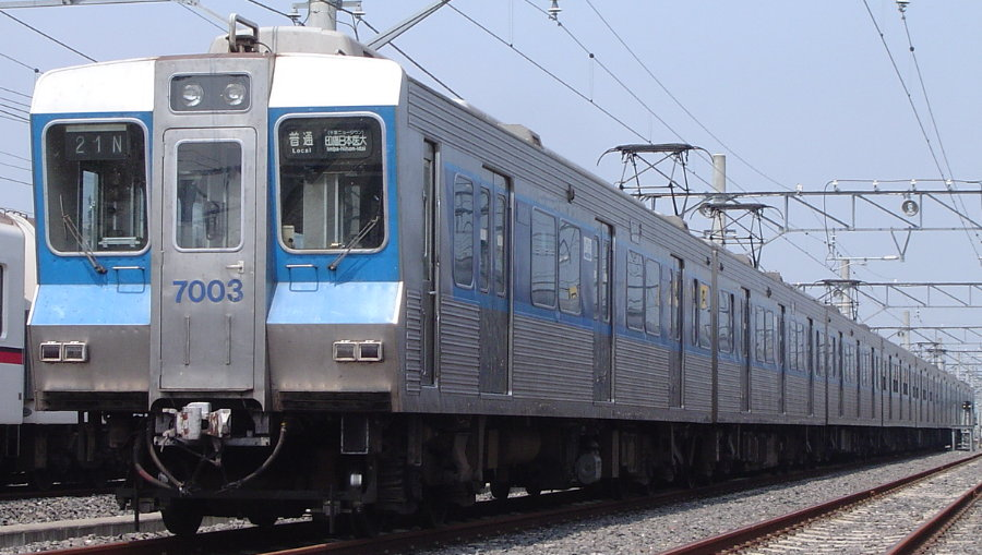 北総開発鉄道7000形電車 北総鉄道印旛車両基地構内で許可を得て撮影